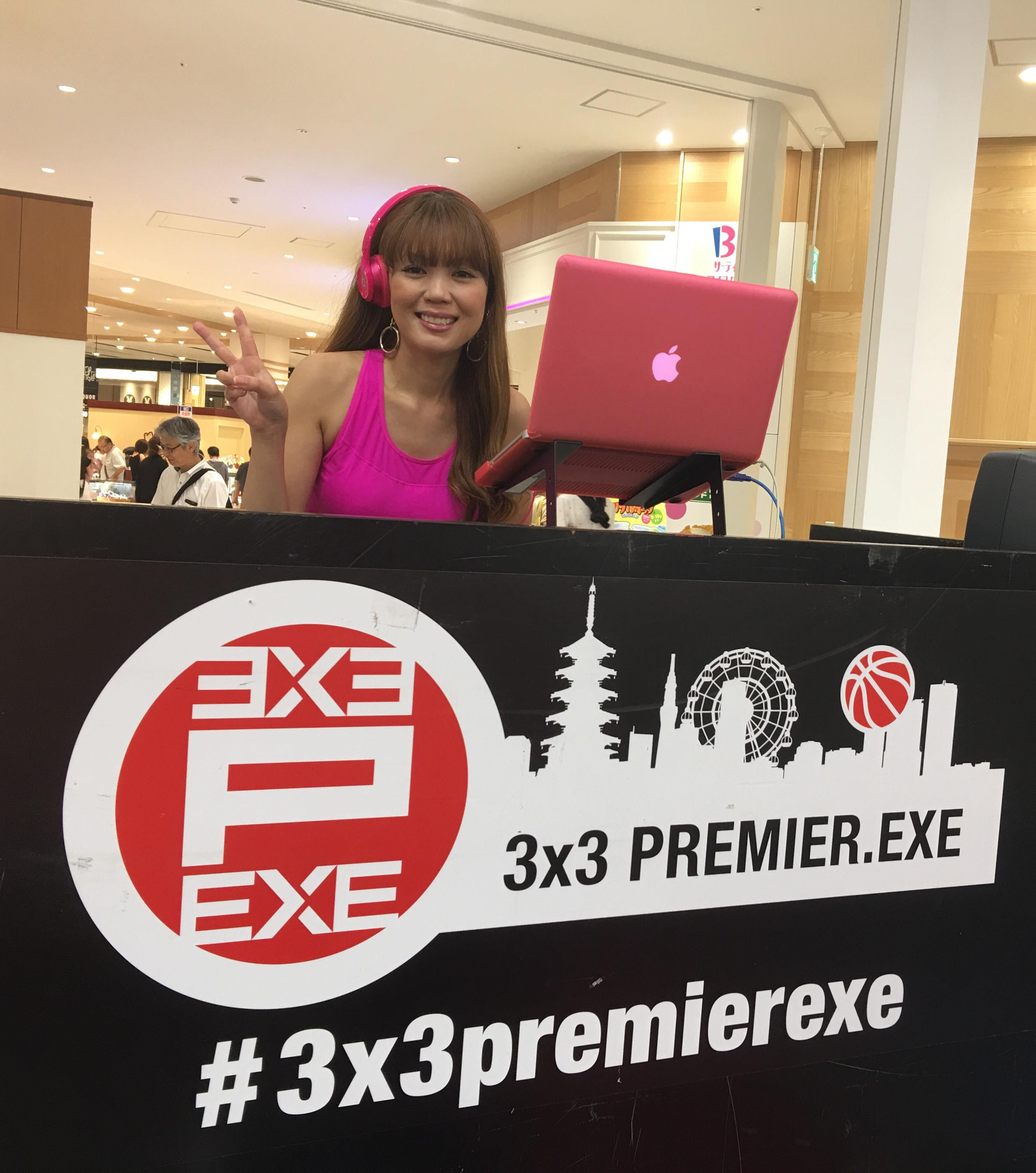 3x3 PREMIER.EXE 2017 岡山大会